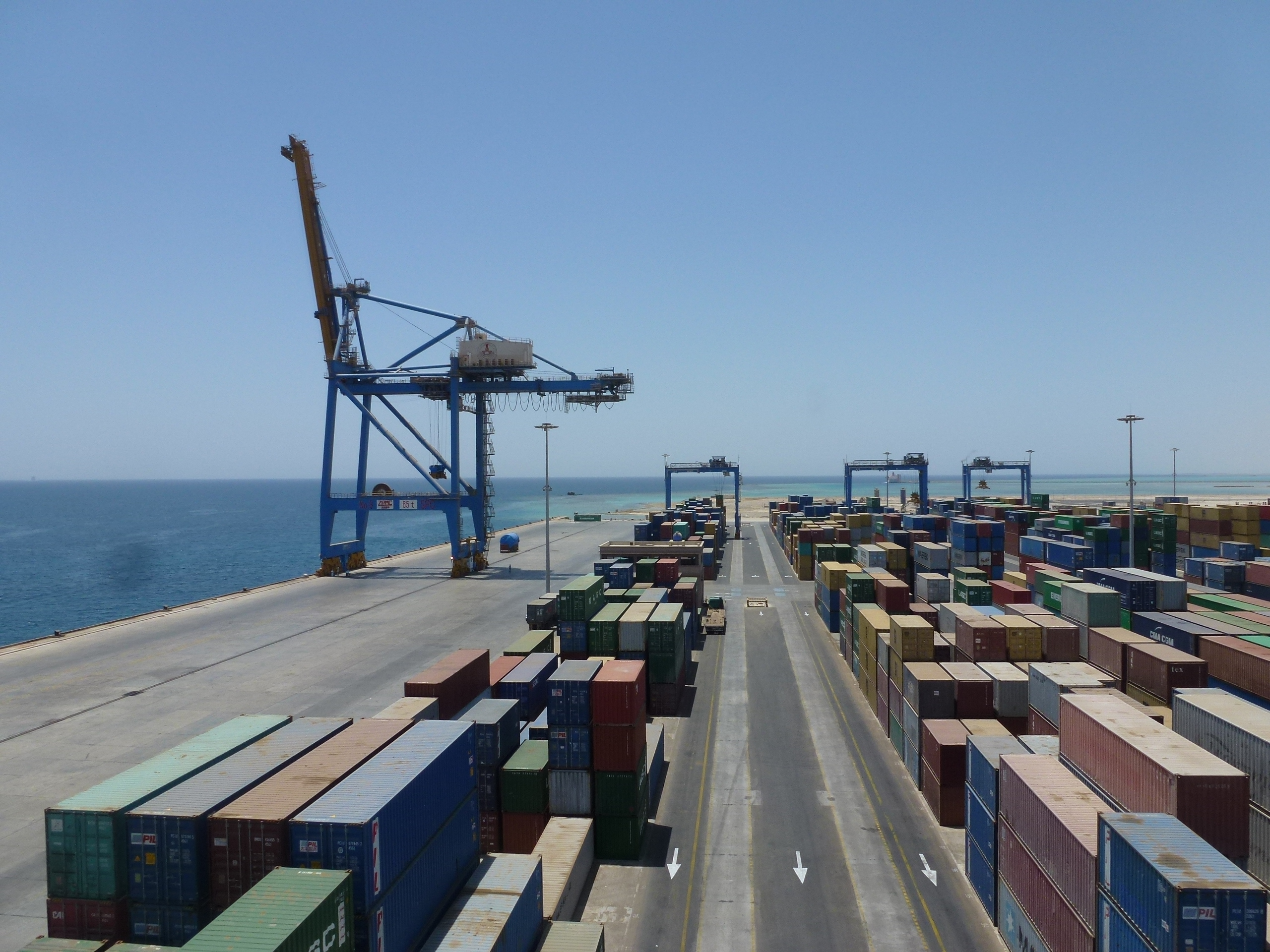 Neuer Container Terminal in Port Sudan